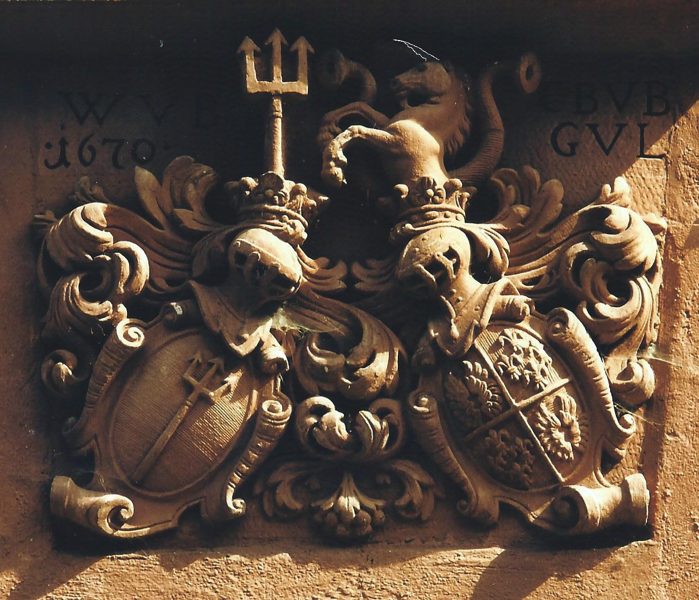 Das Allianzwappen zeigt rechts das der Gerner von Lilienstein , es wurde 1670 als Torschmuck in Schatthausen in Sandstein gefertigt